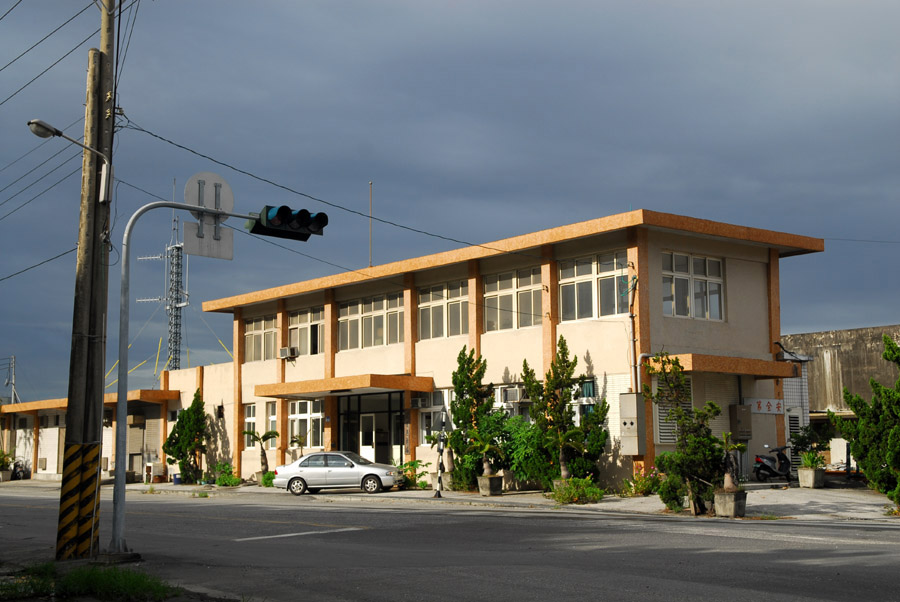 臺灣鐵路管理局花蓮港車站。